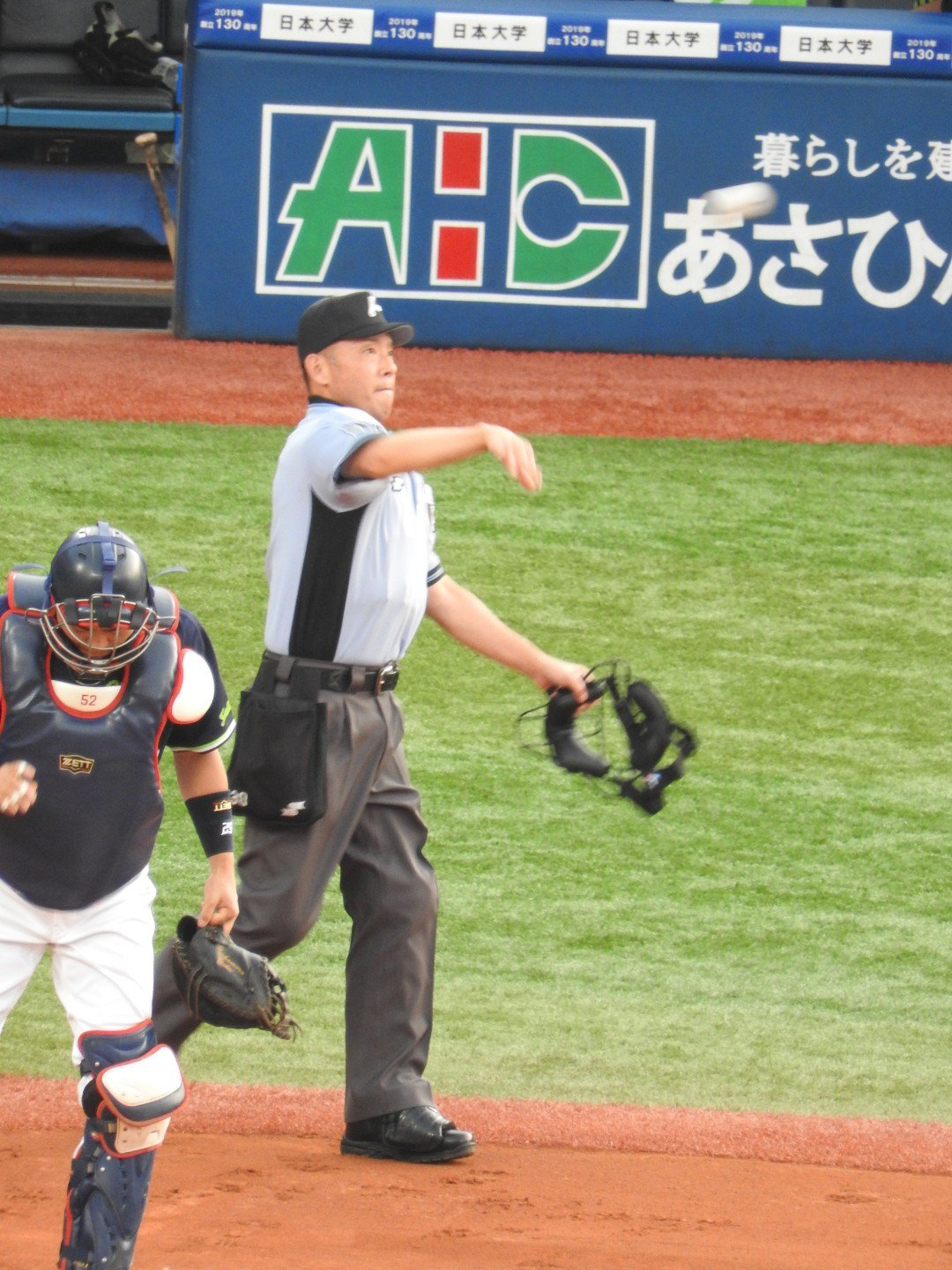 2019年7月30日横浜スタジアムにて